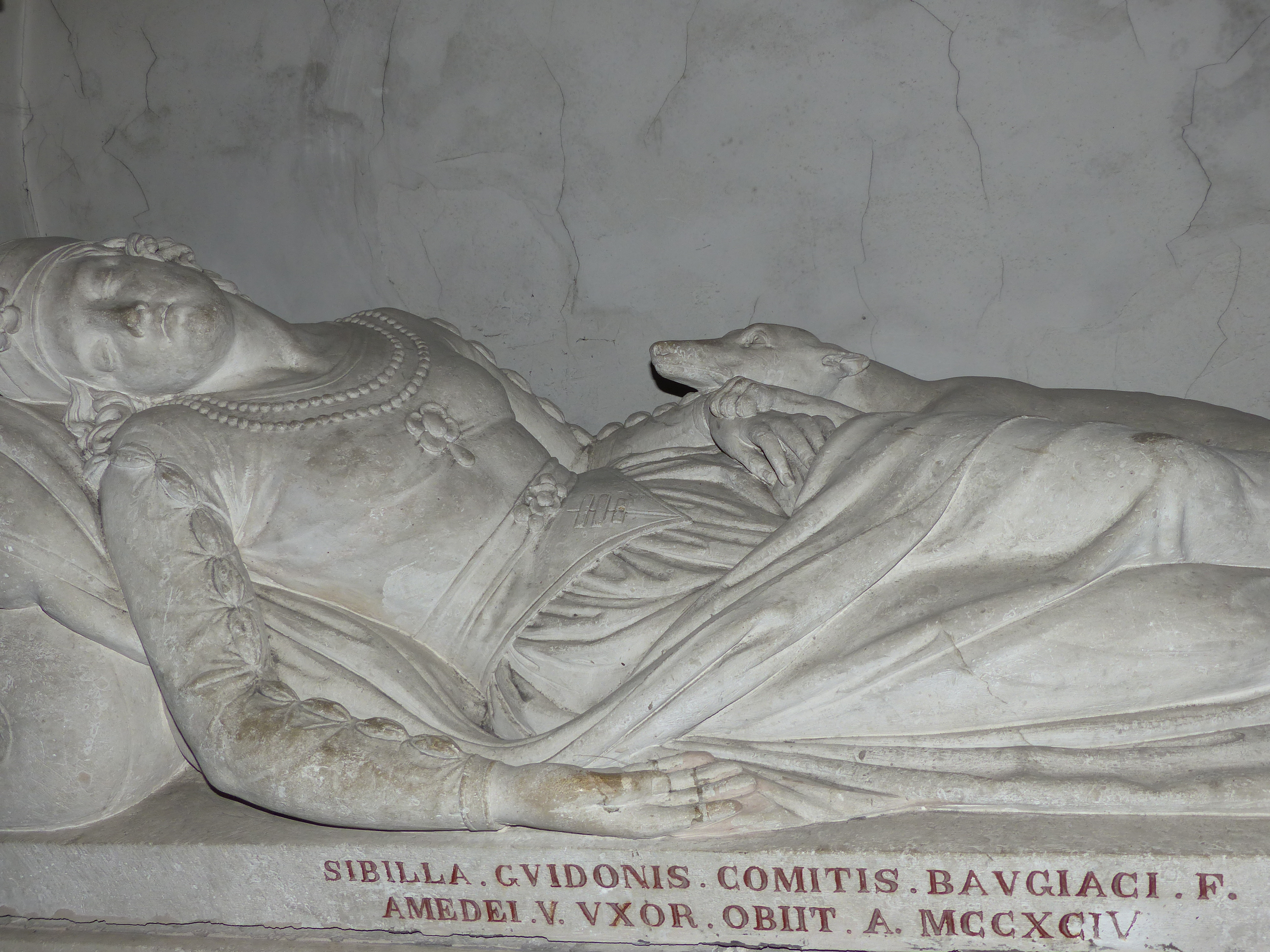 Cénotaphe de Sybille de Baugé à l'abbaye d'Hautecombe